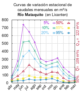 Curvas de variación estacional del río Mataquito en Licanten. # Dirección General de Aguas # Diagnóstico y clasificación de los cursos y cuerpos de agua según objetivos de calidad. Cuenca del río Mataquito # Santiago de Chile # Ministerio de Obras Públicas (Chile) # 2004 # url: # urlarchivo: # Tabla 4.6: Río Mataquito en Licanten (m3/s) pág. 44 mes 5% 10% 20% 50% 85% 95% abr 92.949 79.621 65.726 44.740 26.097 17.638 may 281.731 218.723 160.964 89.582 43.525 28.484 jun 739.555 518.707 337.543 148.494 54.008 29.816 jul 649.305 532.530 410.133 230.096 93.790 48.830 ago 514.414 407.958 305.652 169.683 71.858 36.487 sep 304.991 258.352 209.731 136.294 71.059 41.458 oct 269.888 221.223 173.874 109.731 62.245 44.614 nov 286.325 245.470 202.877 138.547 81.401 55.471 dic 318.188 267.283 214.214 134.061 62.858 30.550 ene 200.574 157.928 116.659 61.216 20.678 5.801 feb 140.376 93.595 57.283 22.413 7.056 3.578 mar 74.222 59.708 45.875 27.721 14.906 10.353 This plot was created with Gnuplot.